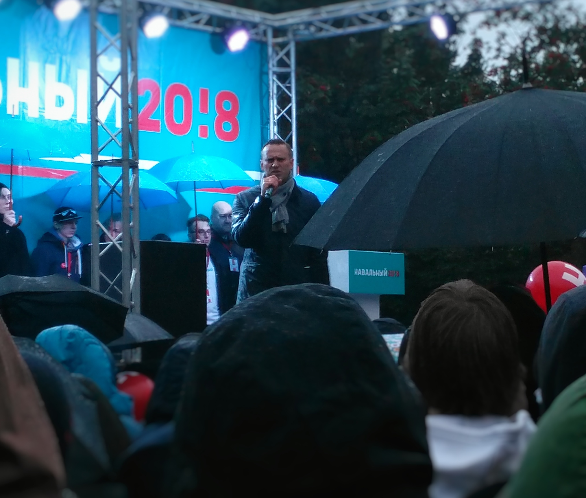 Алексей Навальный, посетивший город Мурманск в рамках своего осеннего тура по городам России, с предвыборной кампанией.